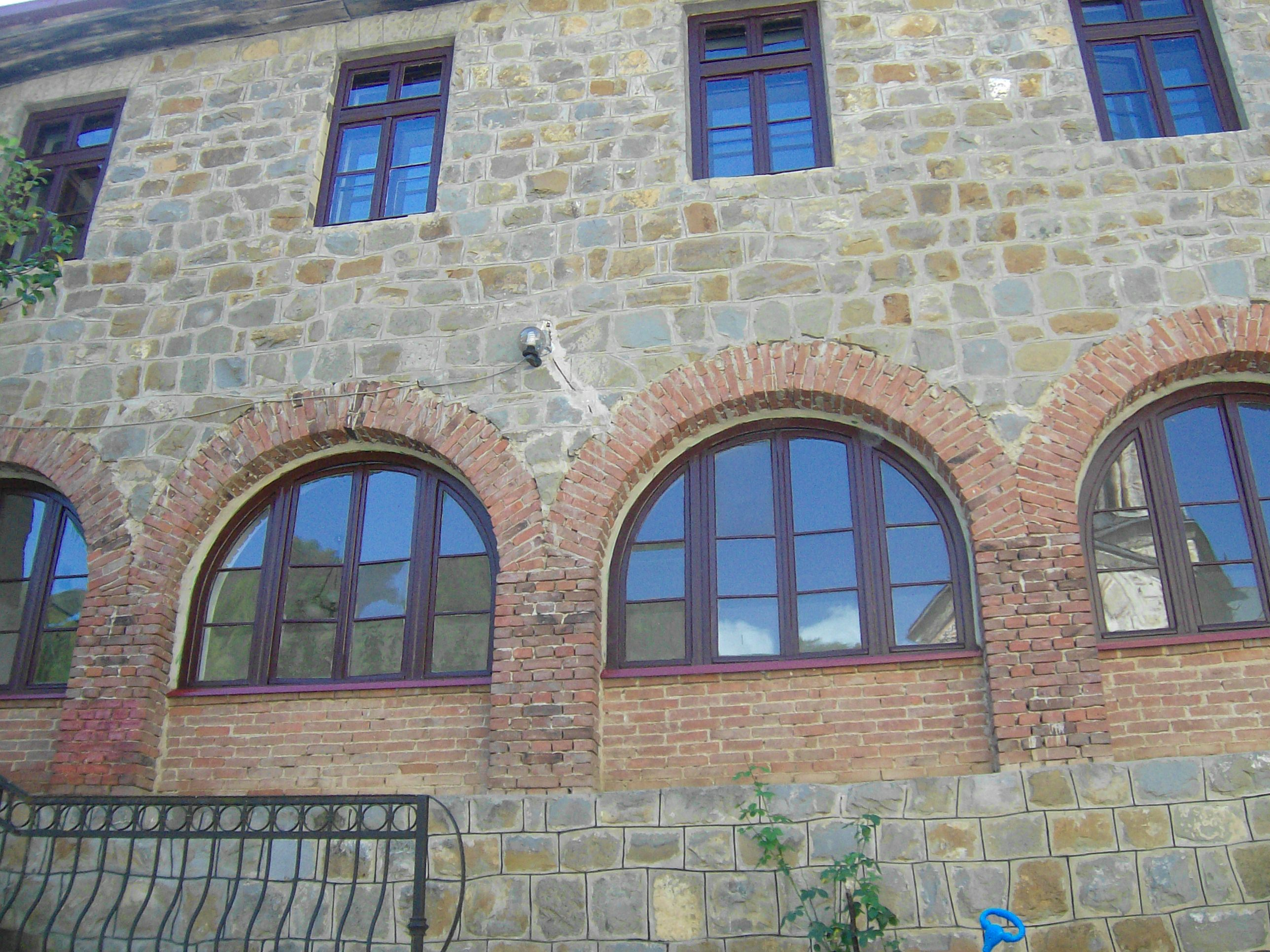 Manastir Sv.Arhangeli (Mihail i Gavril)- Kuceviste- konak